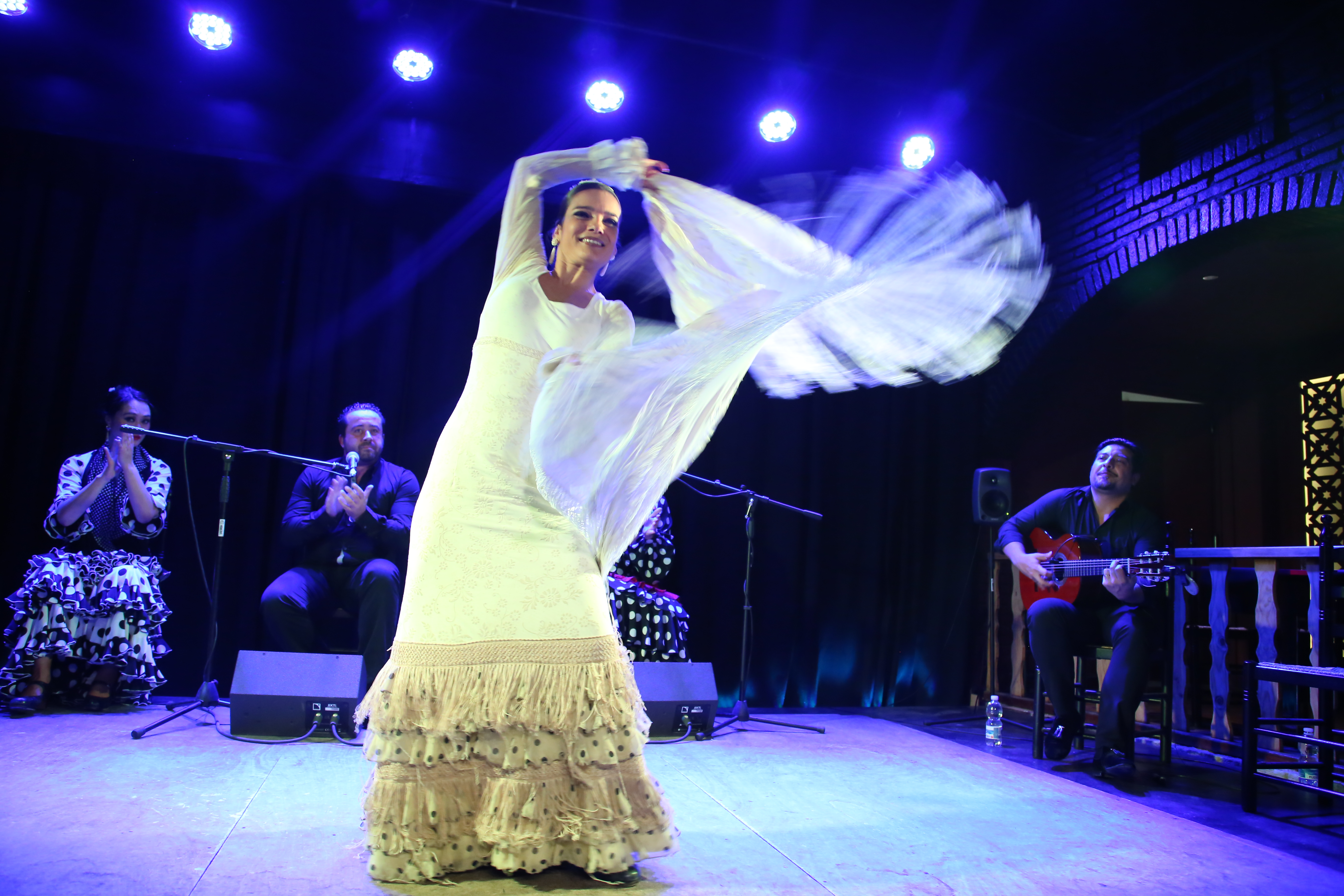 Flamenco en La Bodega Flamenca en Carrer de Roger de Flor, 230, Barcelona